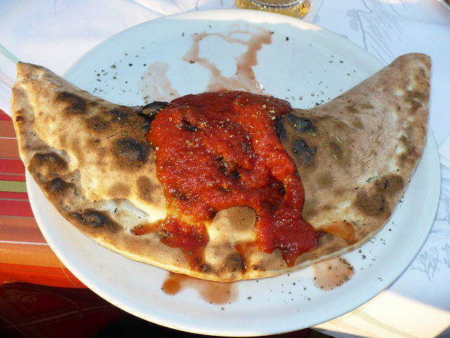 Pizza Calzone in Lindau (Bodensee)